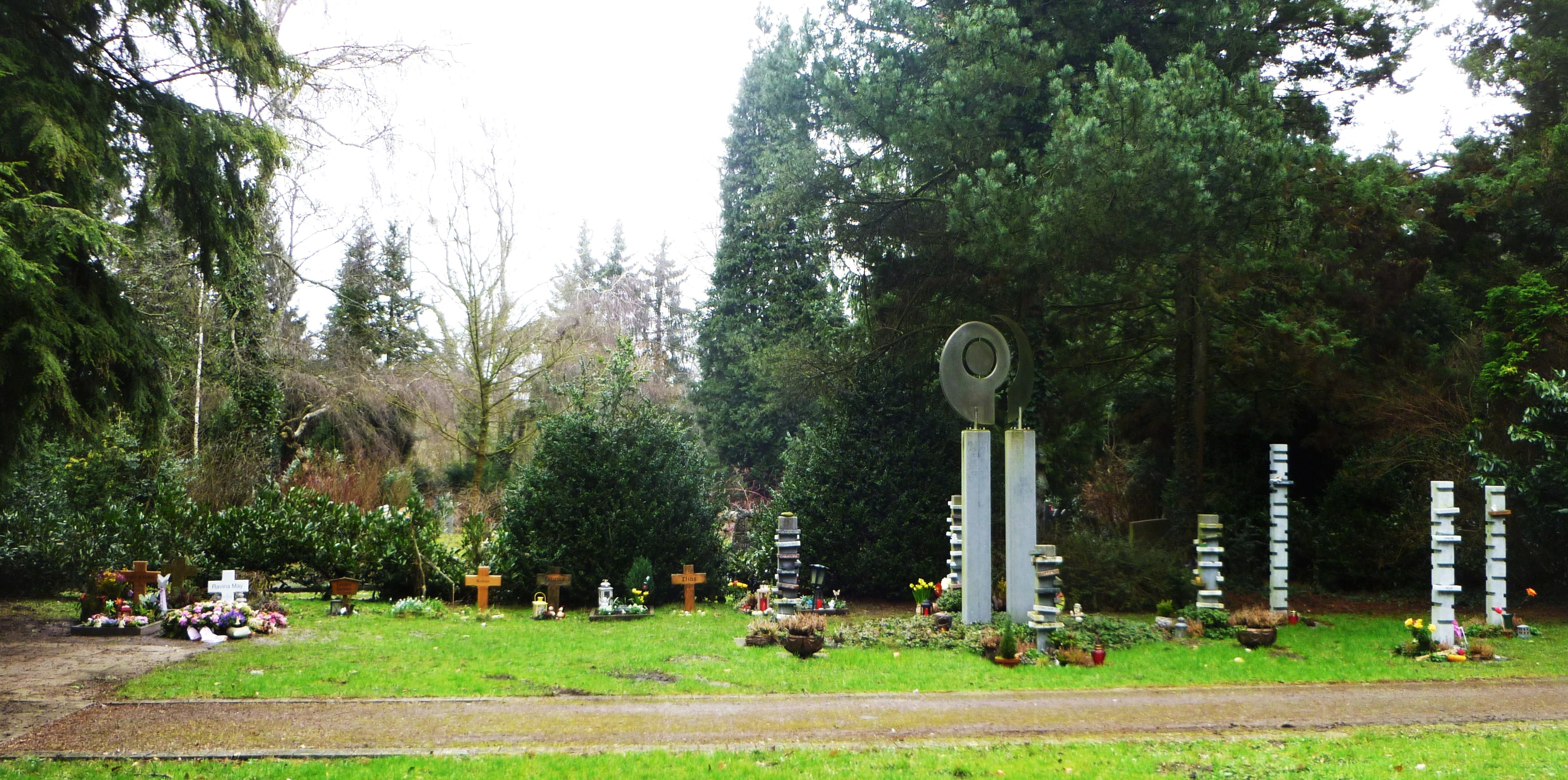 Gedenkstätte für Sternenkinder und Frühverstorbene auf dem Westfriedhof I in Aachen